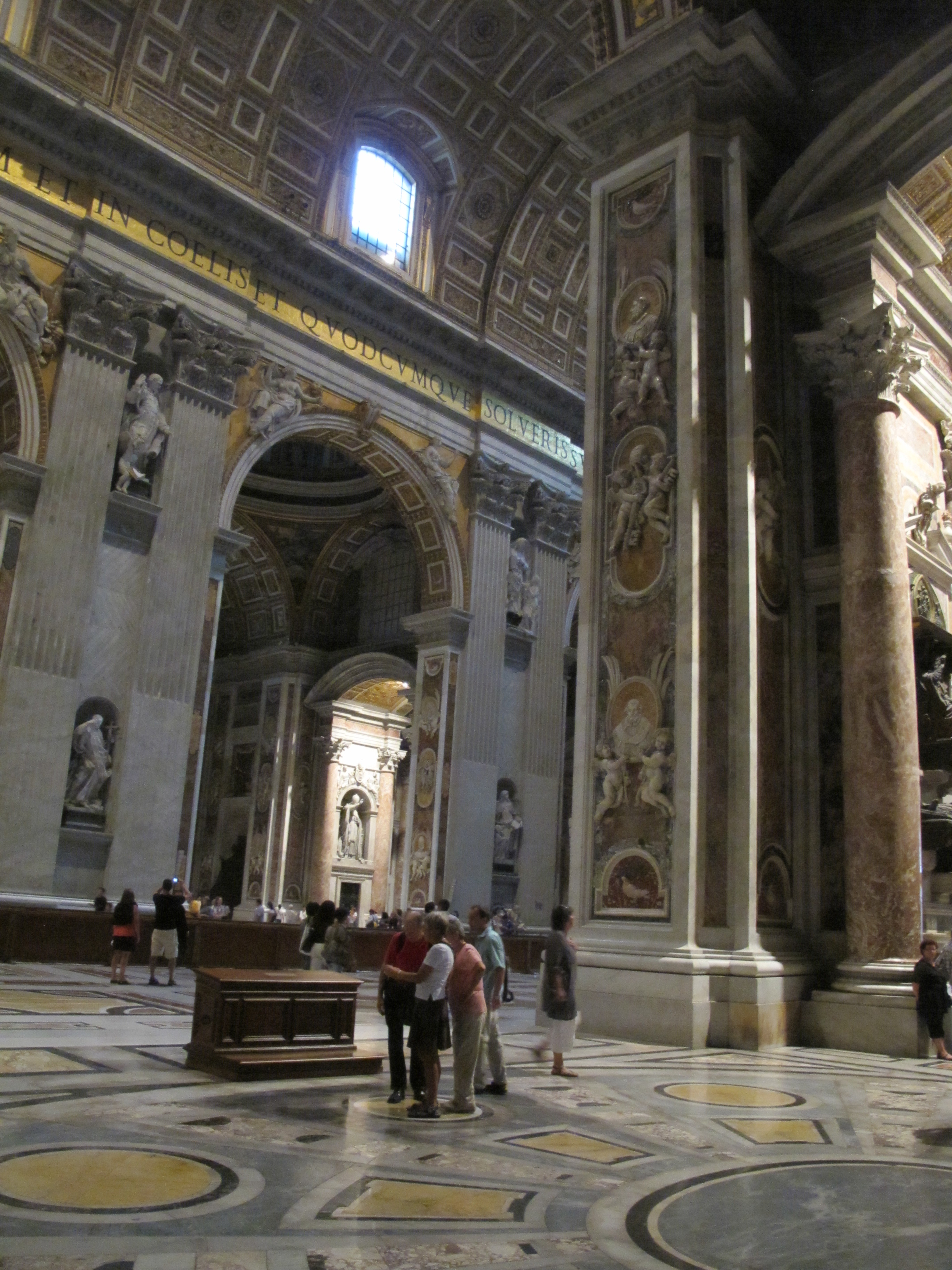 roma, basilica di san pietro